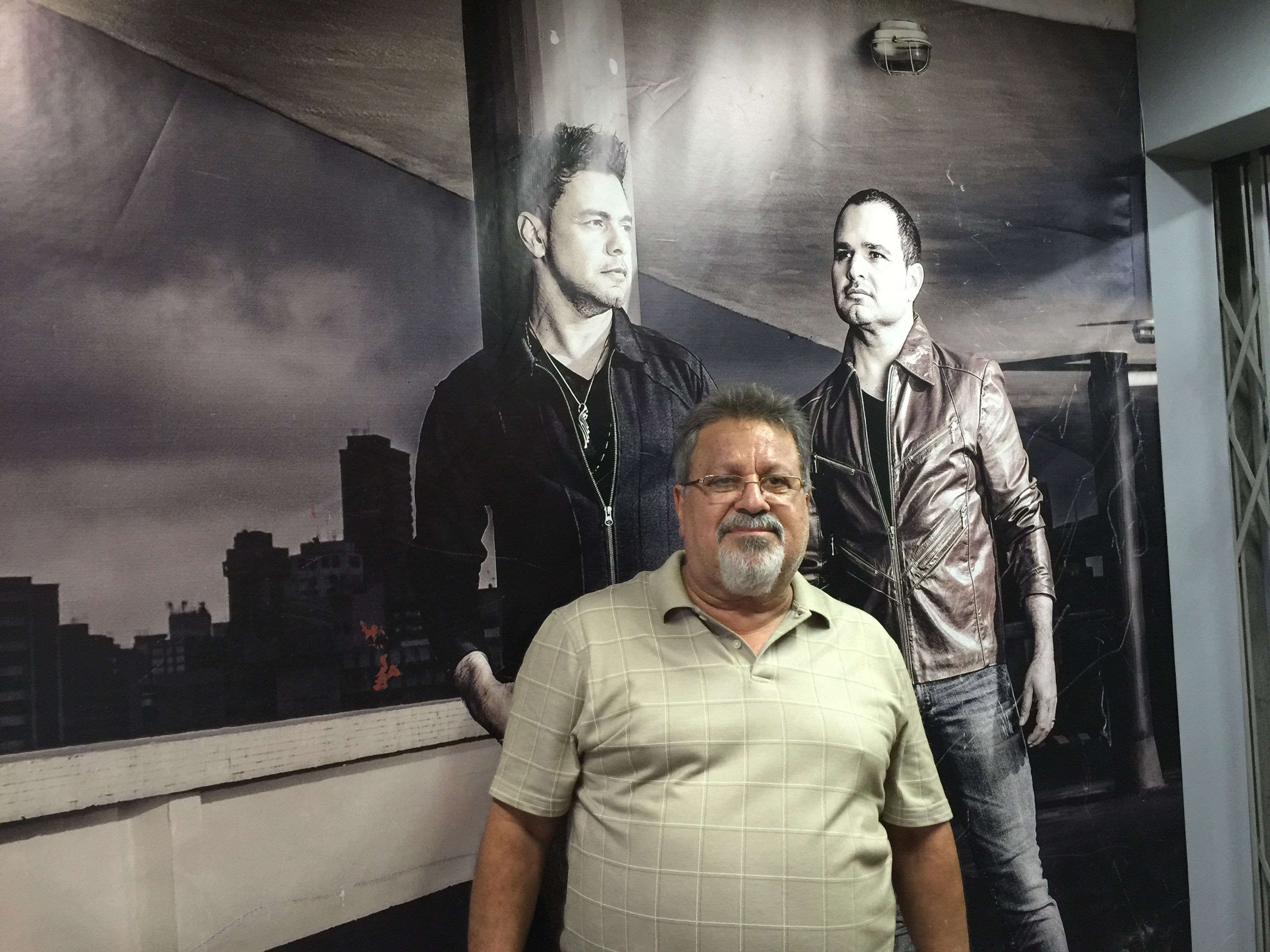 Rio de Janeiro - O diretor de Carnaval da Imperatriz Leopoldinense, Wagner Araújo, disse que apesar da crise, a escola não tem dívida (Cristina Indio do Brasil/Agência Brasil)